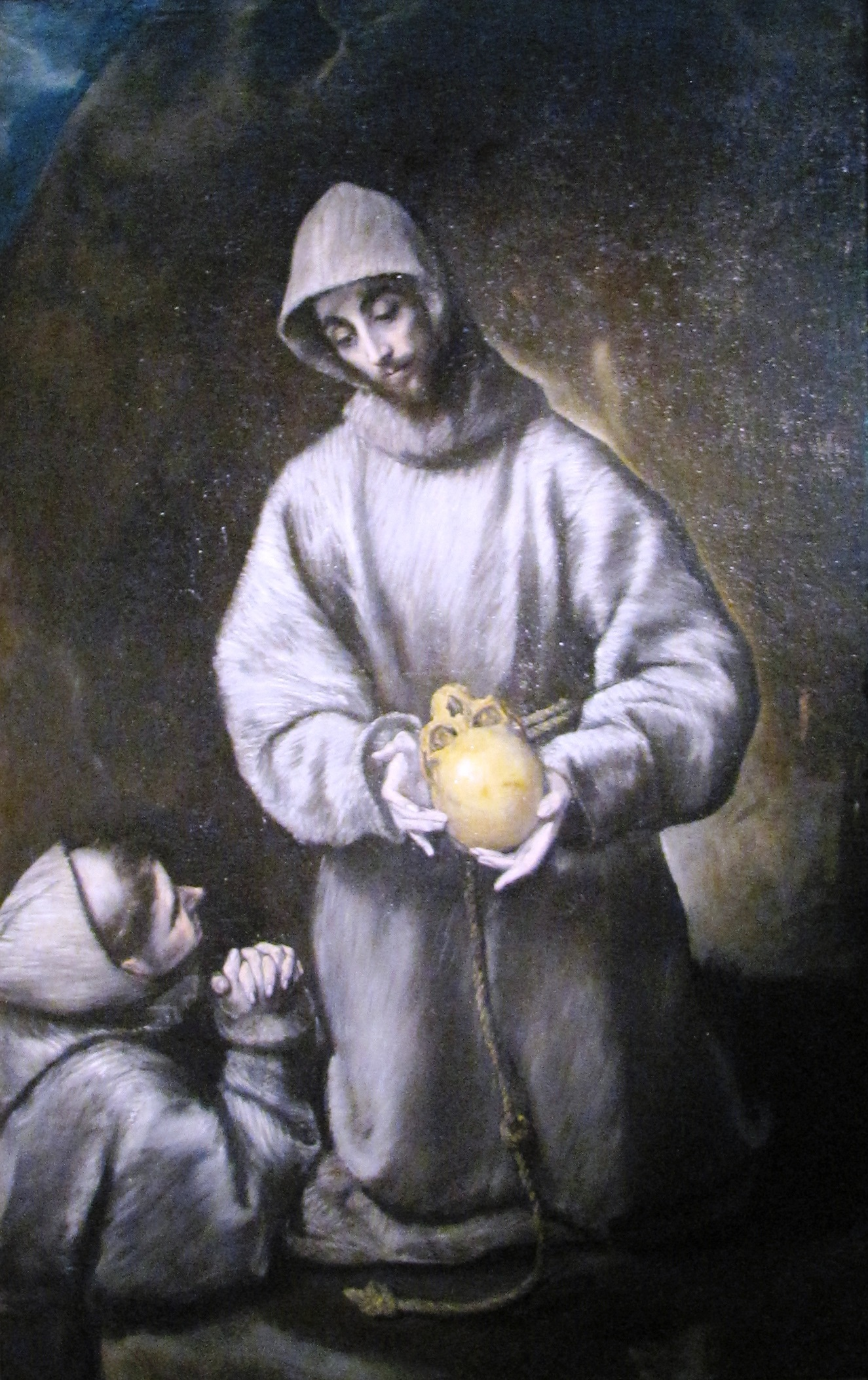 Cuadro del Greco, en el Museo de Nuestra Señora de La Antigua, Monforte de Lemos